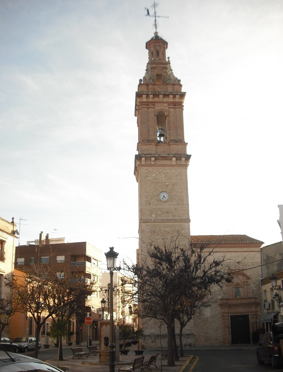 Iglesia de Santos Abdón y Senén en Carpesa (Valencia). Estuvo dedicada a San Pedro hasta 1948.